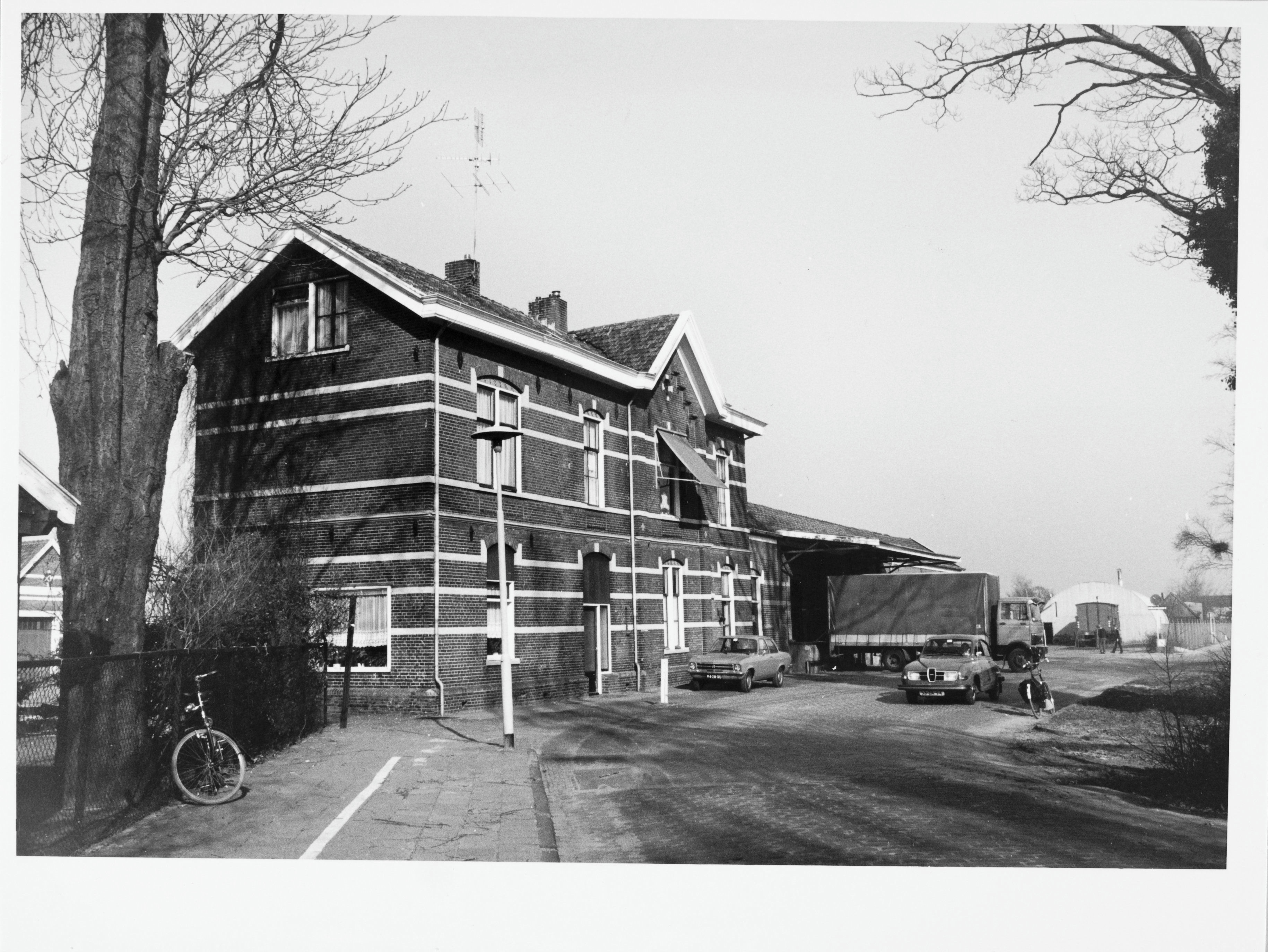 Voormalig station G.O.L.S. Lijn Doetinchem-Ruurlo-Meede-Hengelo: Overzicht van de voorgevel en linker zijgevel (opmerking: Afdrukken verkregen via Ypie Attema, oud medewerkster van de Rijksdienst voor de Monumentenzorg.)